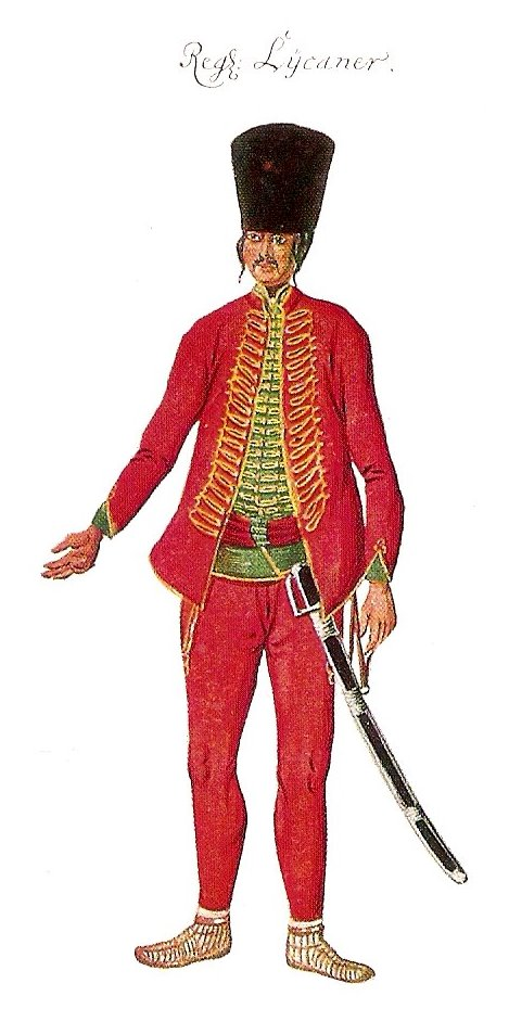 Kaiserliches Infanterieregiment Likaner 1762 (Grenzer) (1769: No. 60)